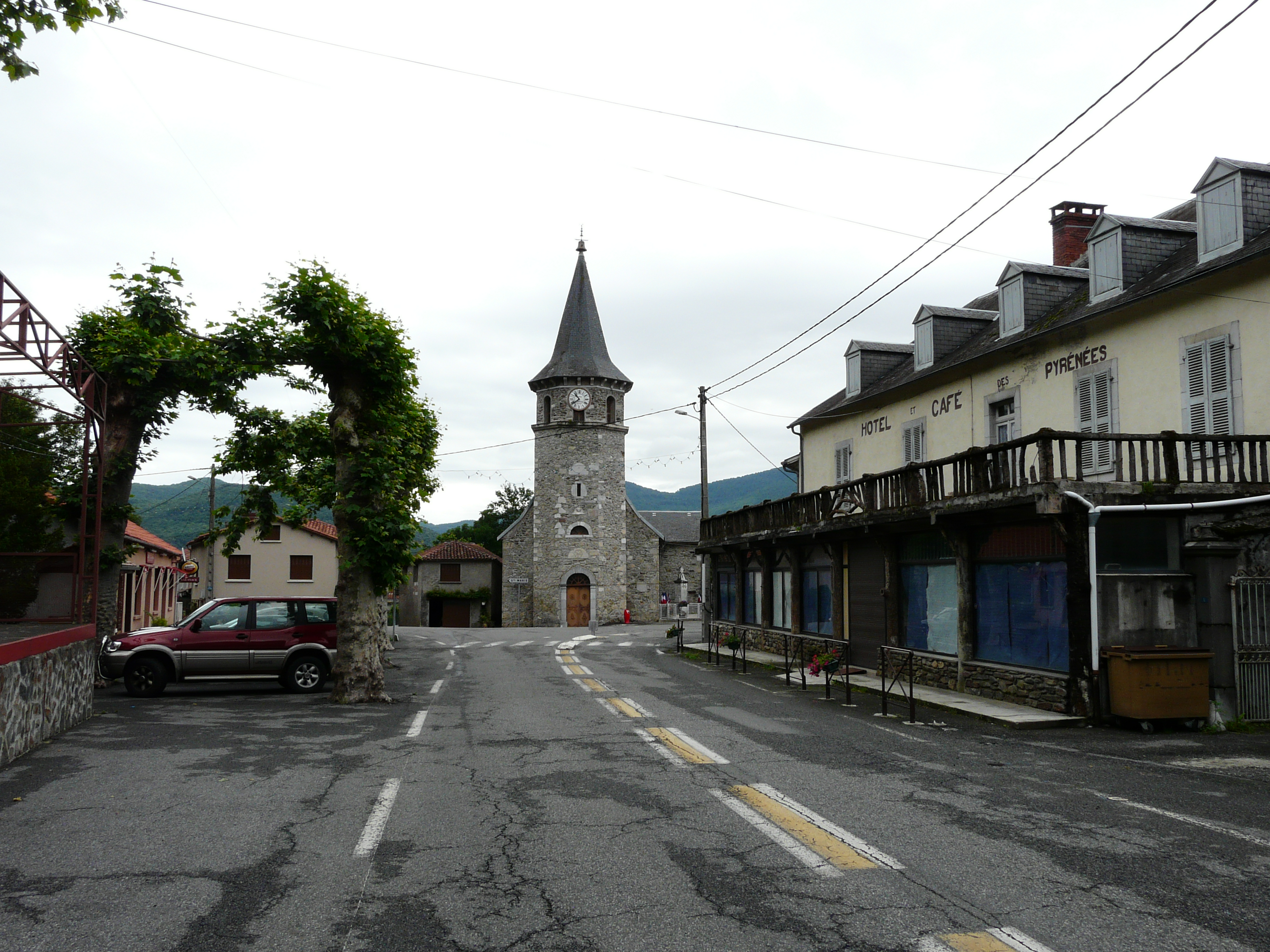 Le village de Siradan, Hautes-Pyrénées, France.